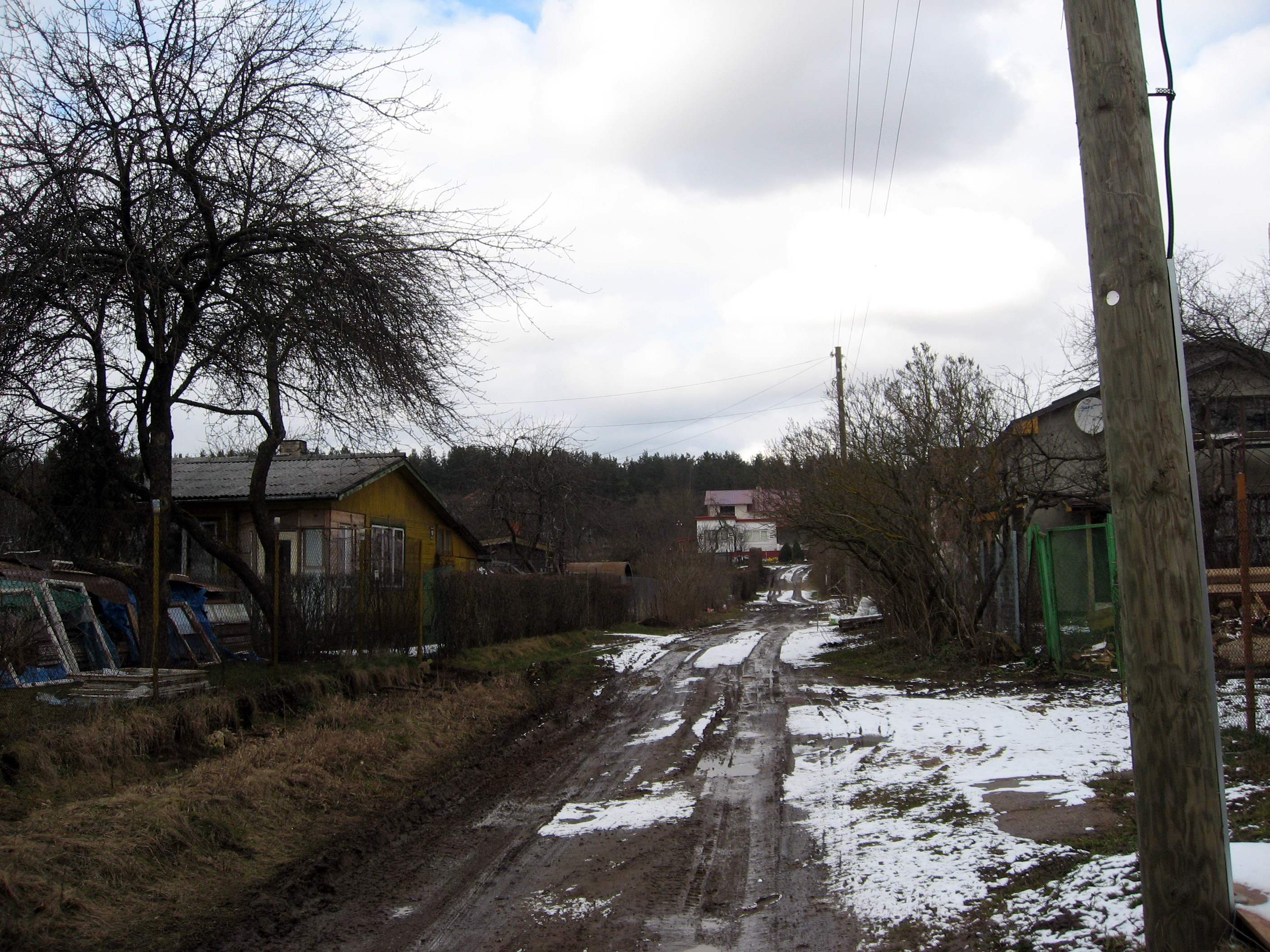 Dārziņi, jedna z ulic